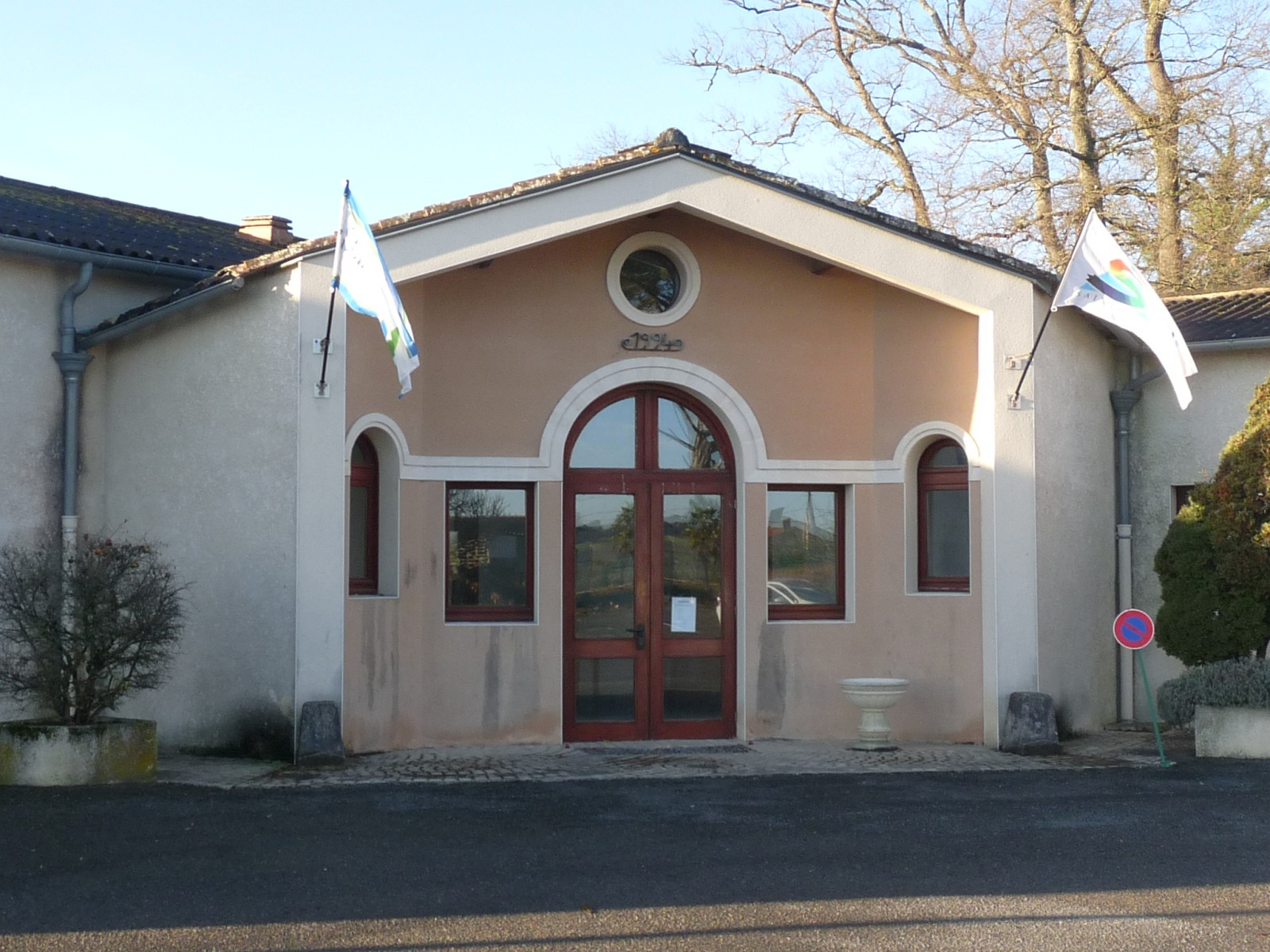 Salle des fêtes, Pommiers-Moulons, Charente-Maritime, France